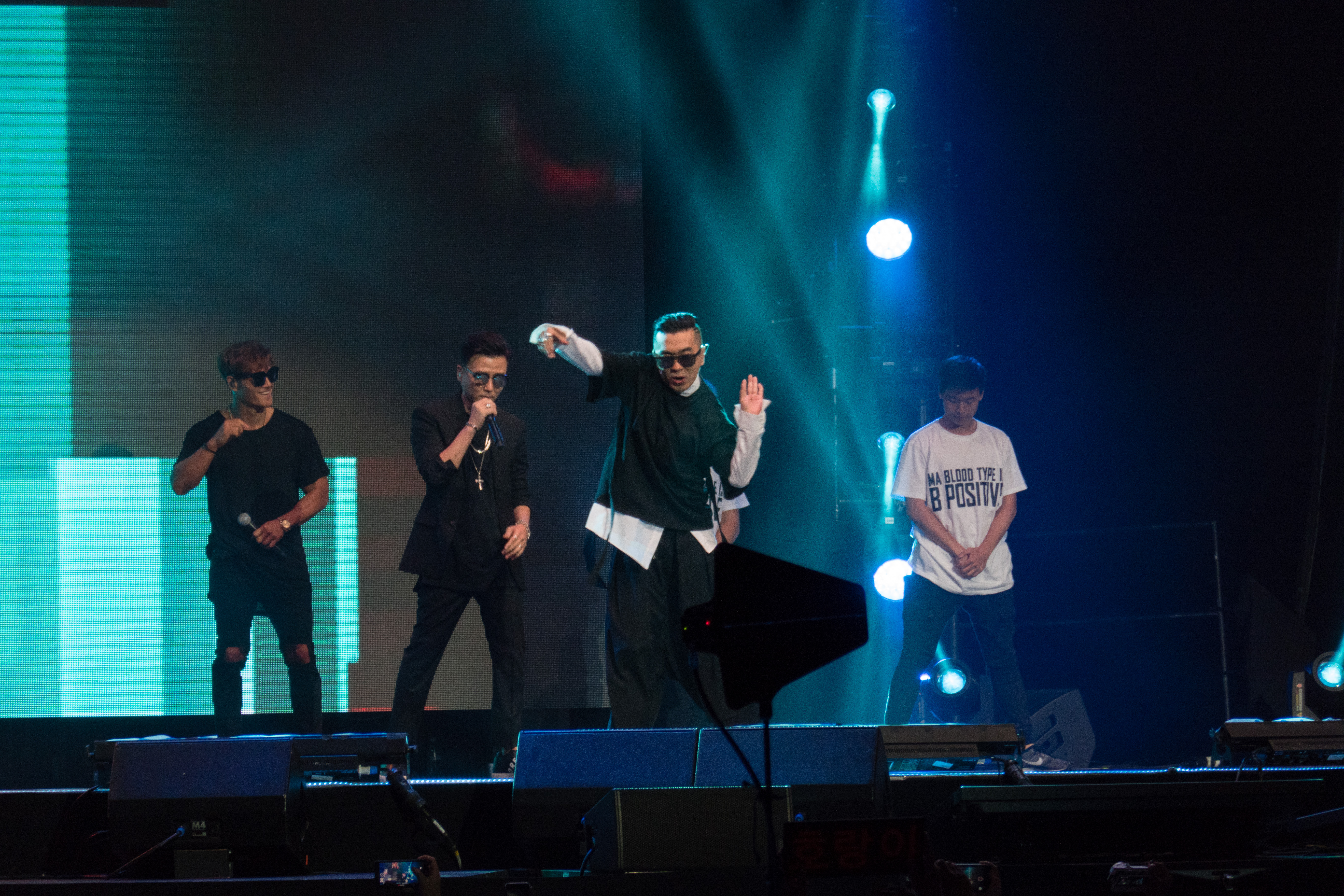 20160731-P1010006